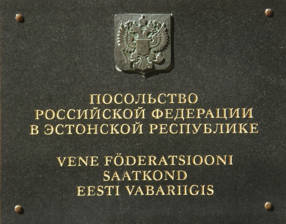 Tahvel Vene saatkonna seinal Tallinnas.